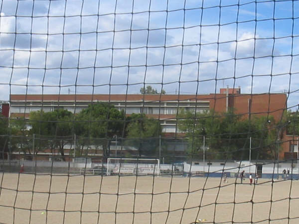 Campo de fútbol en el que juega el C.D. San Cristóbal de los Ángeles.